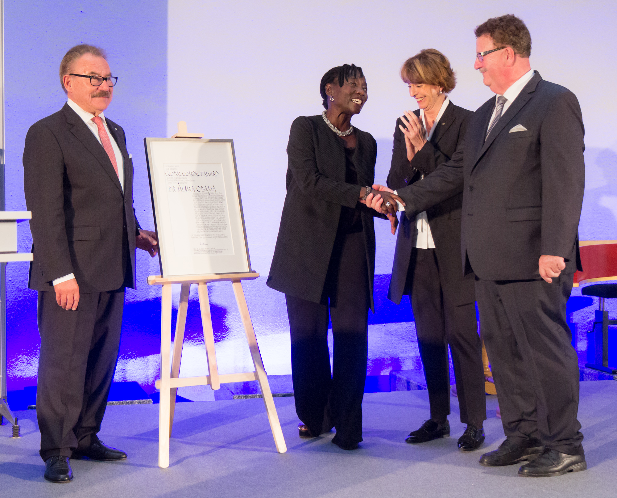 Dr. Auma Obama wird in der Piazzetta des Kölner Rathauses für Engagement für Entwicklungszusammenarbeit mit dem Internationalen TÜV Rheinland Global Compact Award geehrt. V.l.n.r.: Prof. Dr.-Ing. Bruno O. Braun, Auma Obama, Oberbürgermeisterin Henriette Reker, Hans-Joachim Fuchtel, Parlamentarischer Staatssekretär im Bundesministerium für wirtschaftliche Zusammenarbeit und Entwicklung